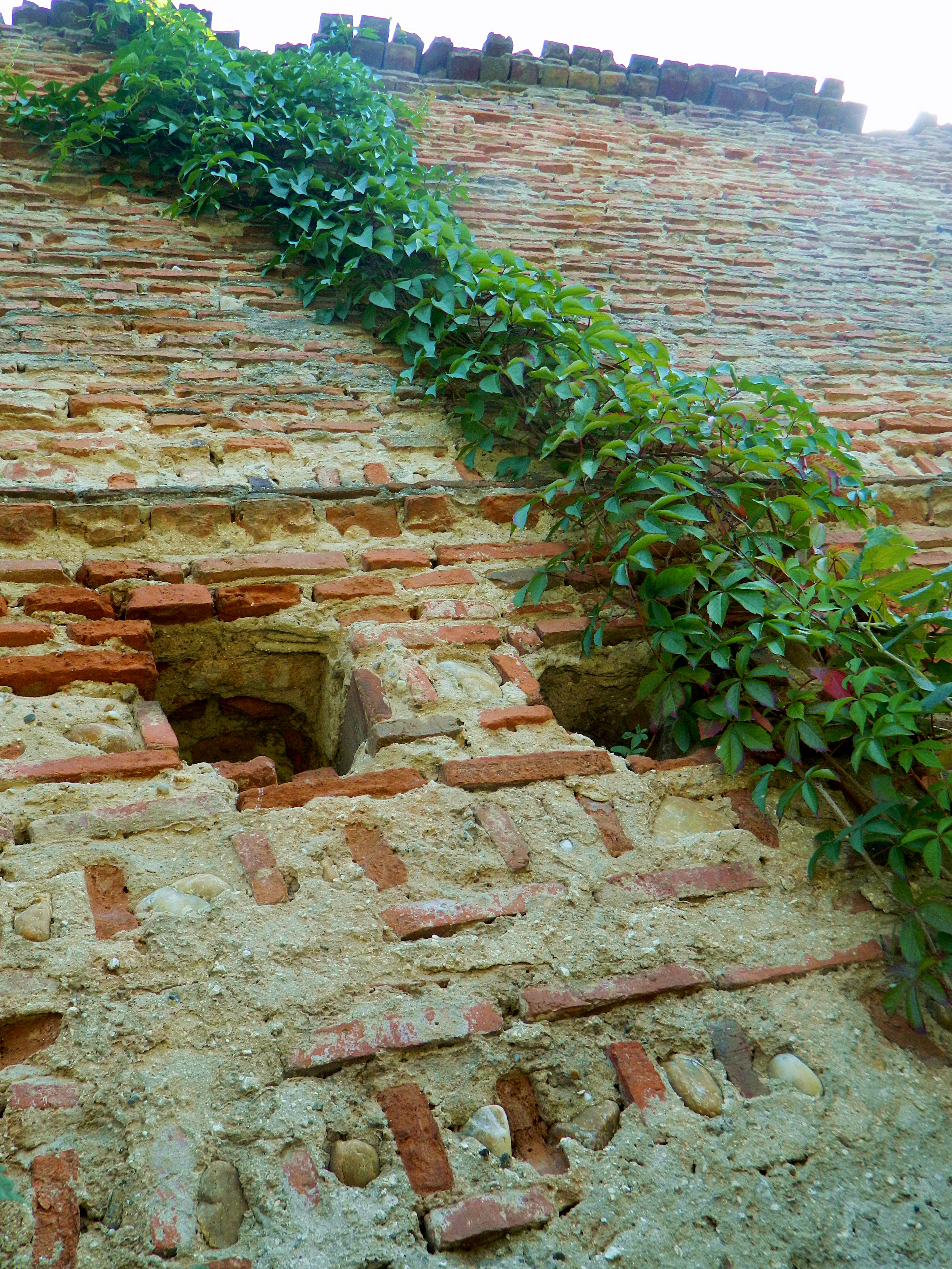 Zid de incintă 03